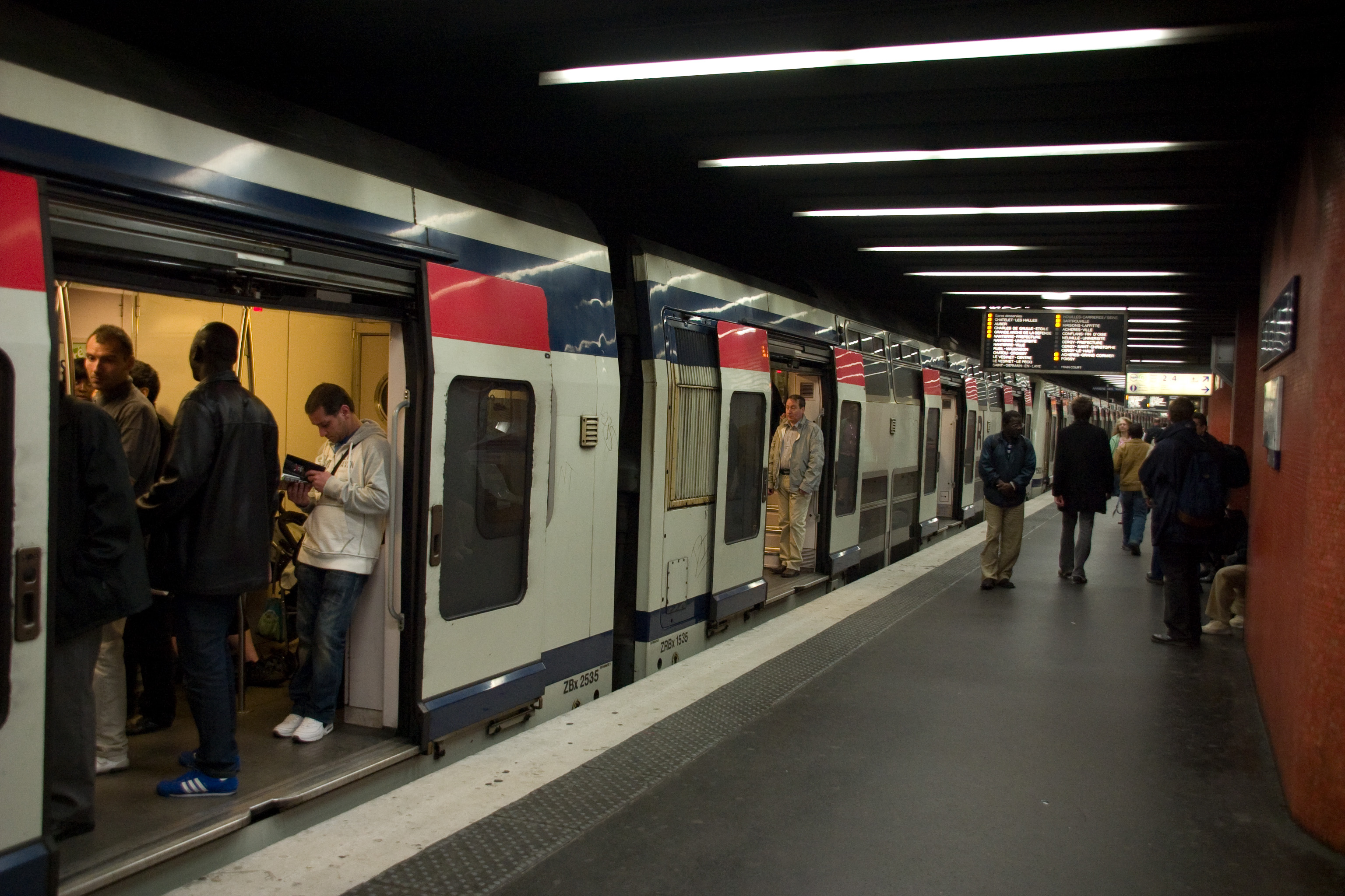 Gare de Lyon, Paris, France